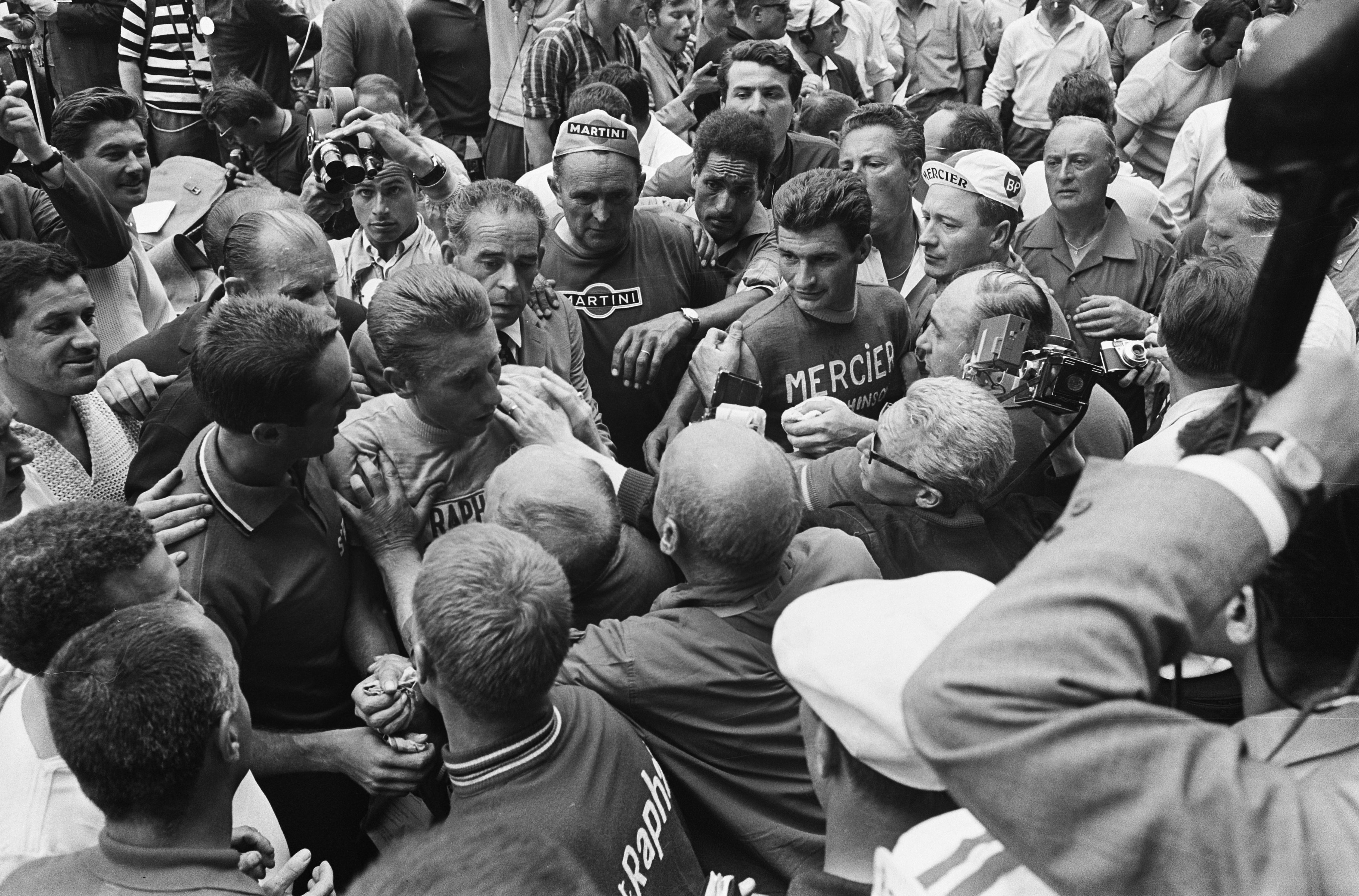 Tour de France aankomst Parijs Anquetil (l) en Poulidor in de menigte.